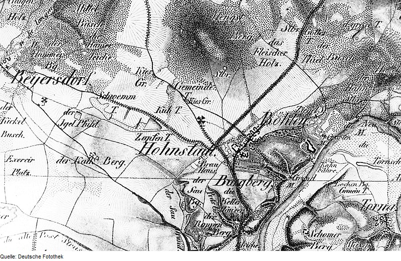 Original image description from the Deutsche Fotothek Grimma-Hohnstädt. Oberreit, Sect. Leipzig, 1936/39